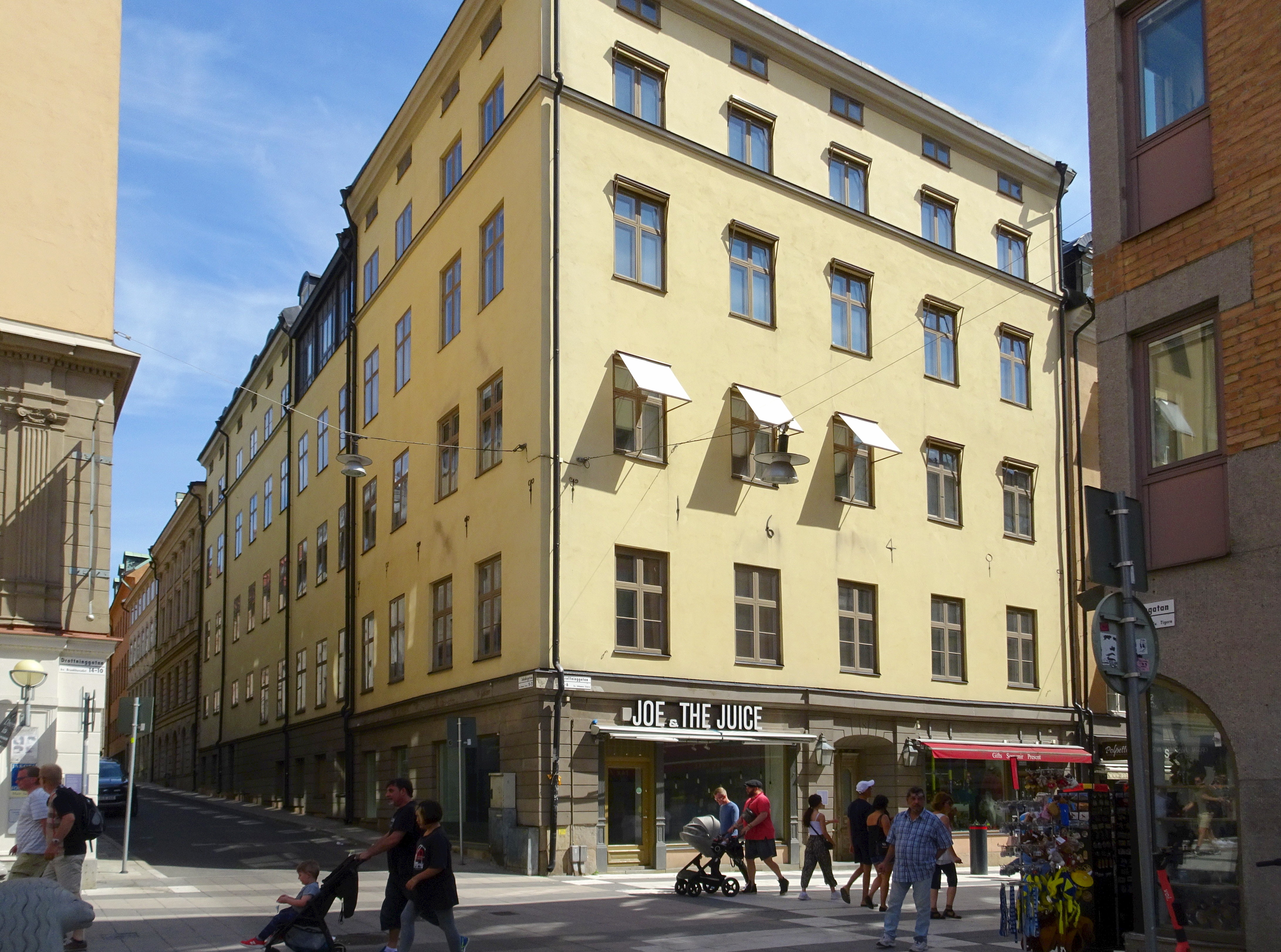 Drottninggatan 8, Kanngjutarmästarens hus, byggår 1640, ett av de bäst bevarade bostadshusen från 1600-talet utanför Gamla stan.